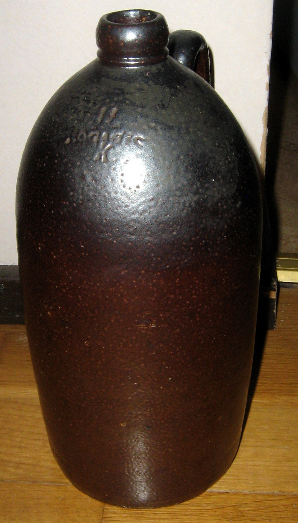 Höganäskrus